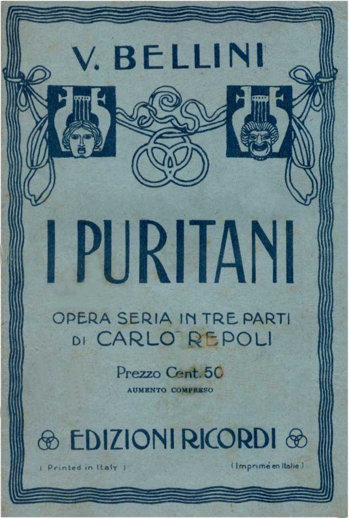 Copertina libretto "I Puritani" opera seria in tre parti di Carlo Pepoli musica di V. Bellini - edizioni Ricordi